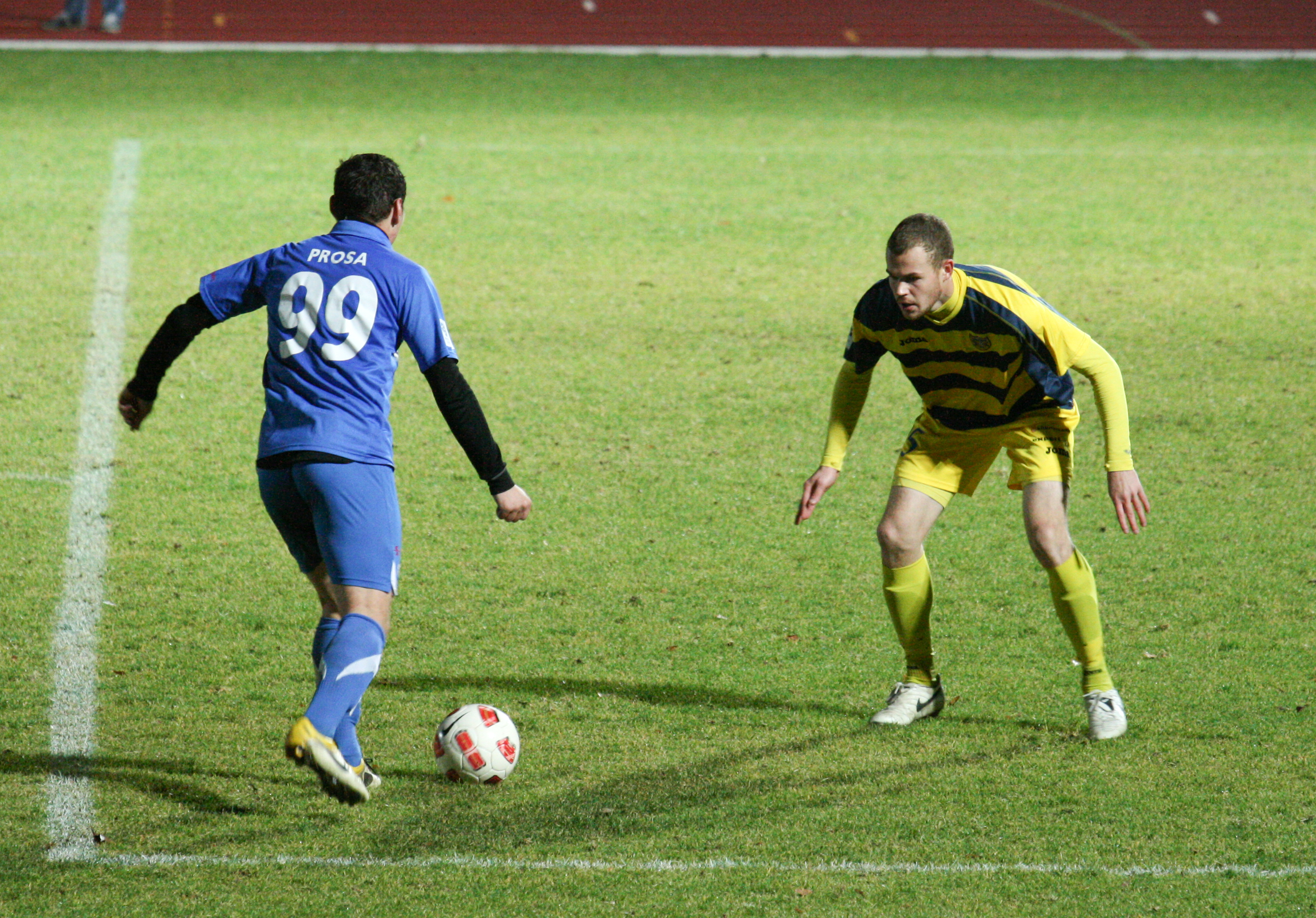 FC Kuressare (triibulises)